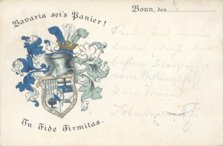 Couleurkarte der K.D.St.V. Bavaria Bonn im Cartellverband